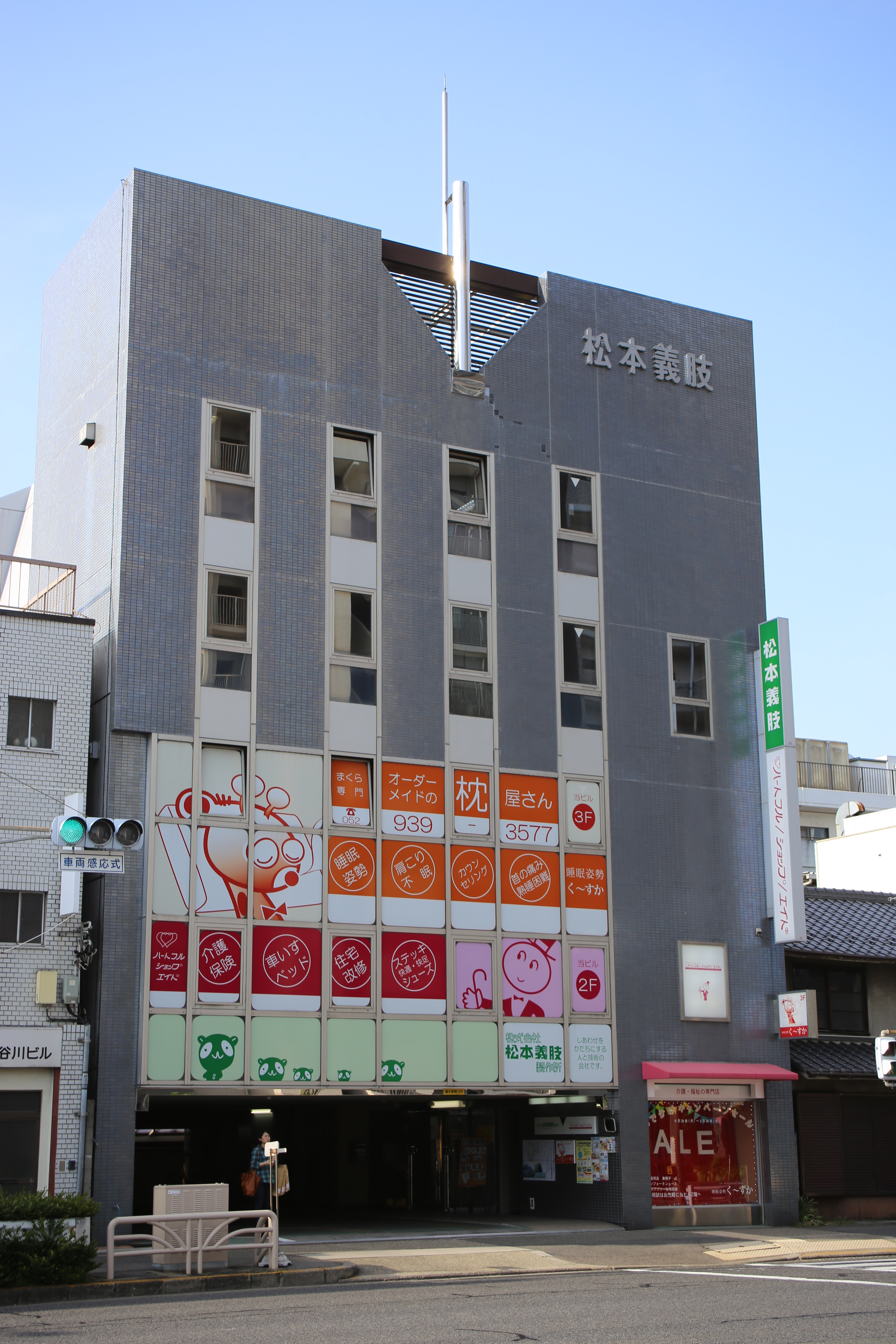 名古屋市東区飯田町の松本義肢本社を南側公道西側より撮影